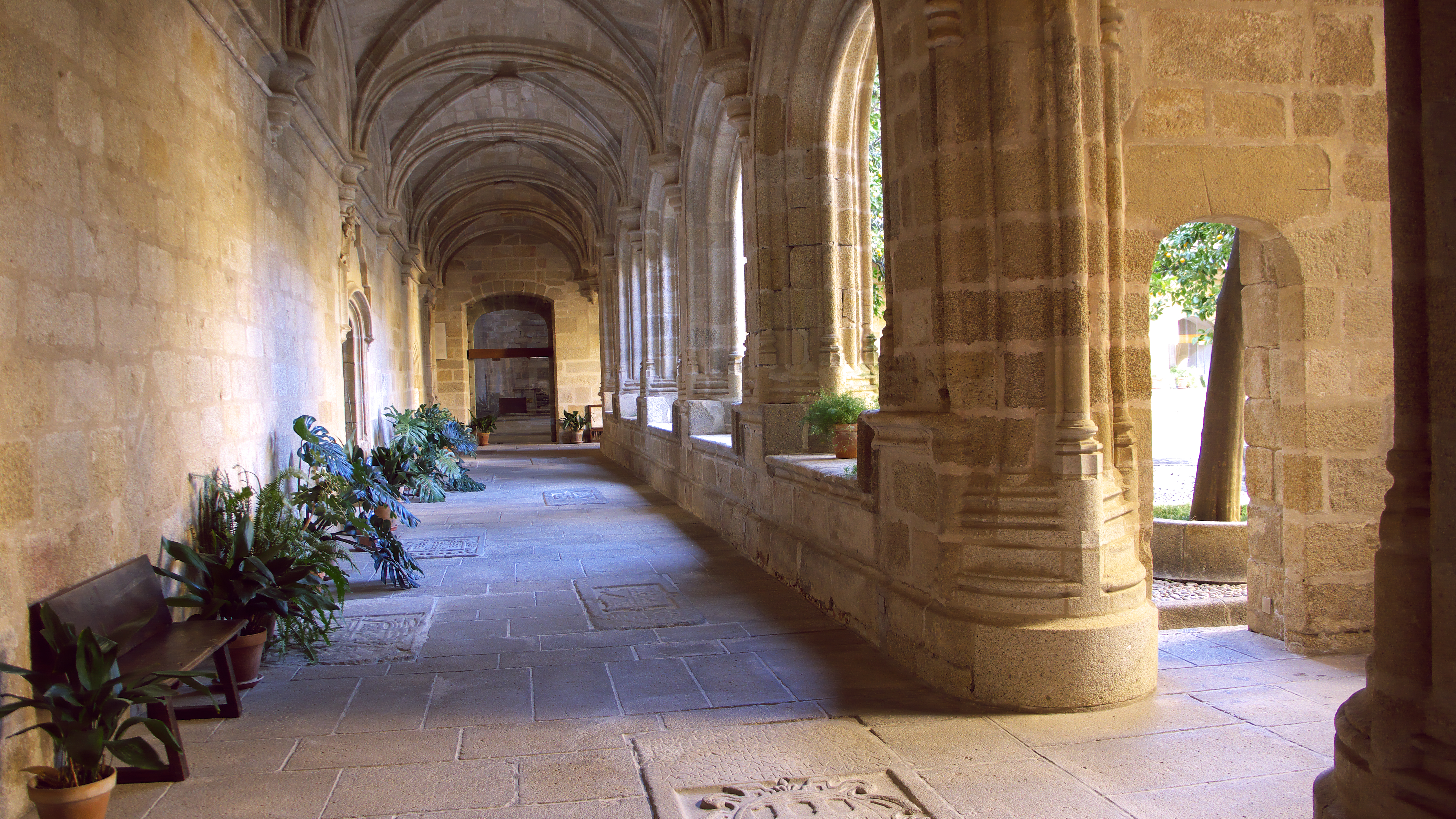 Claustro gótico(s. XVI). Trazas de Pedro de Larrea, Maestro Mayor de la Orden Religioso-Militar de Alcántara.